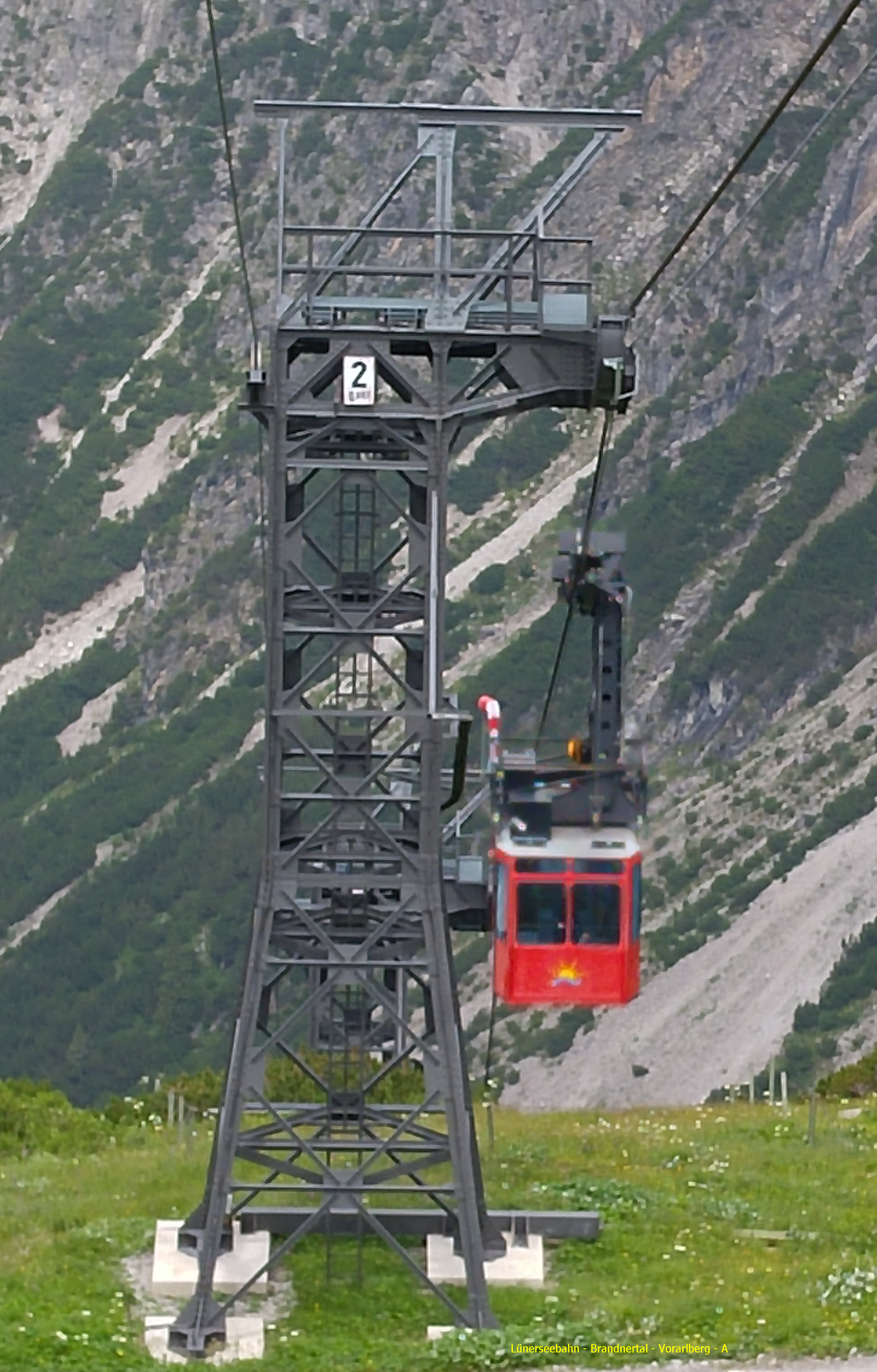 Kabelbaan: Lünerseebahn, Brand, Brandnertal, Vorarlberg.